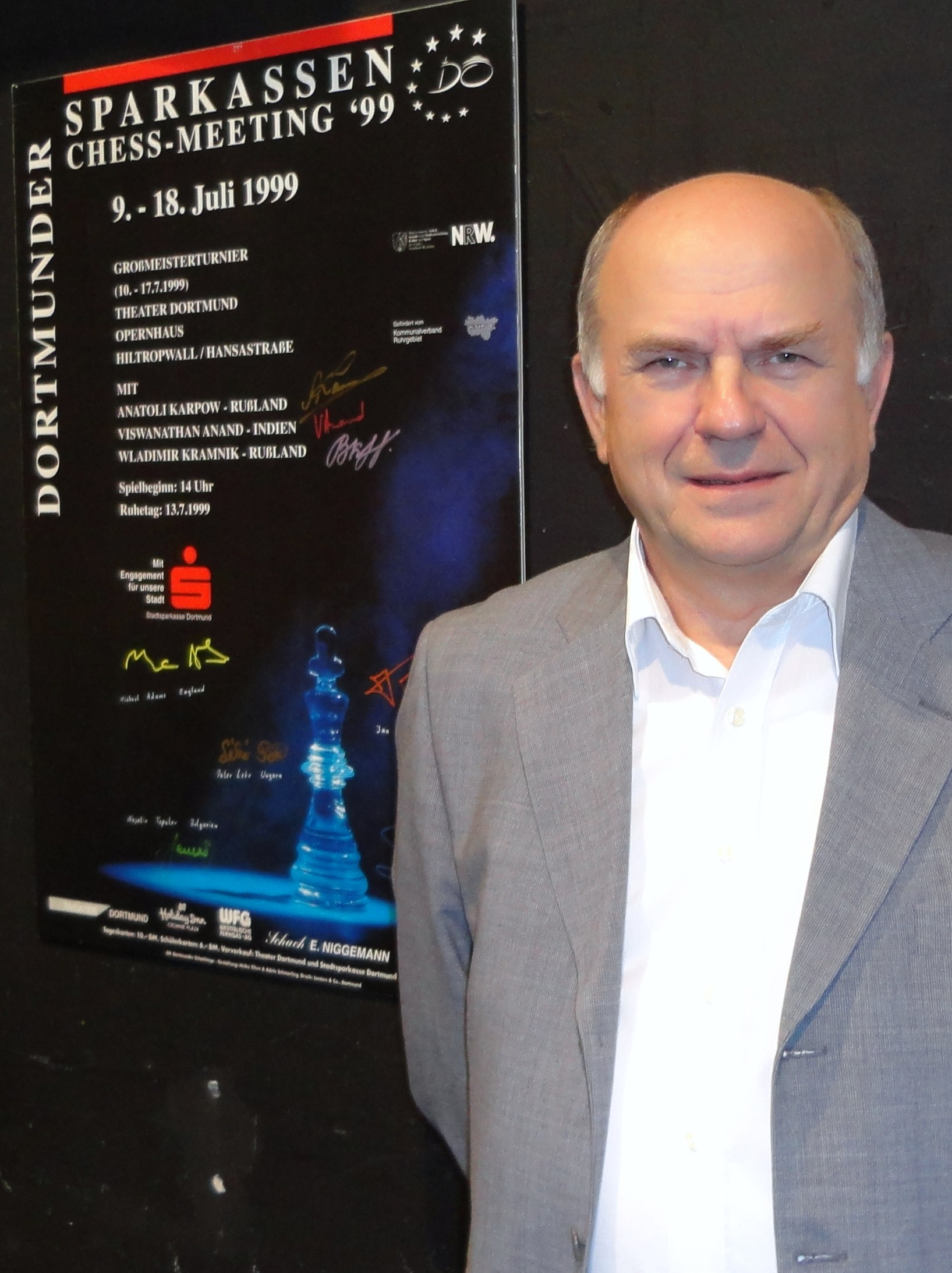 Jerzy Konikowski im Pressezentrum der Dortmunder Schachtage 2012.